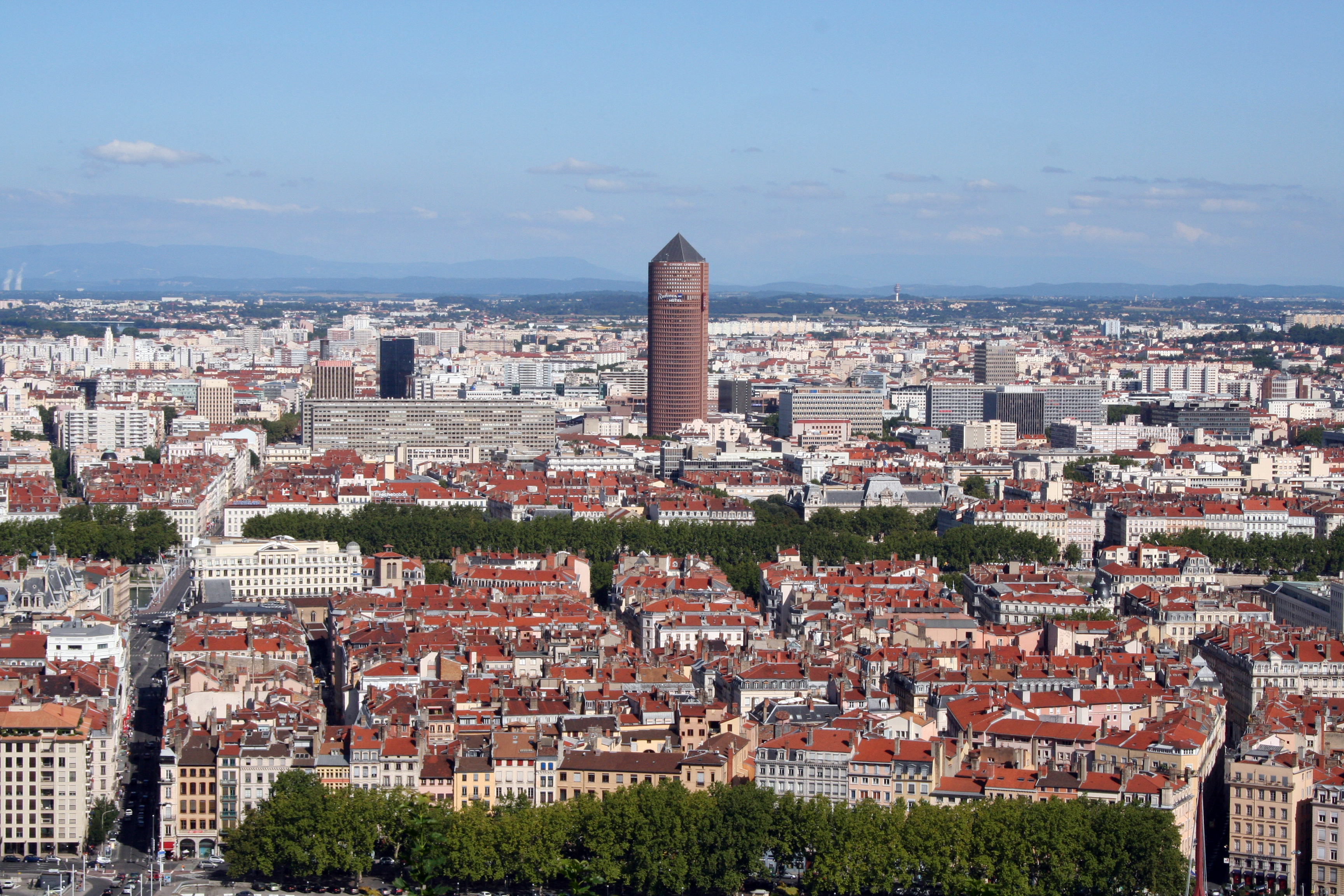 Tour du Crédit Lyonnais à la Part-Dieu